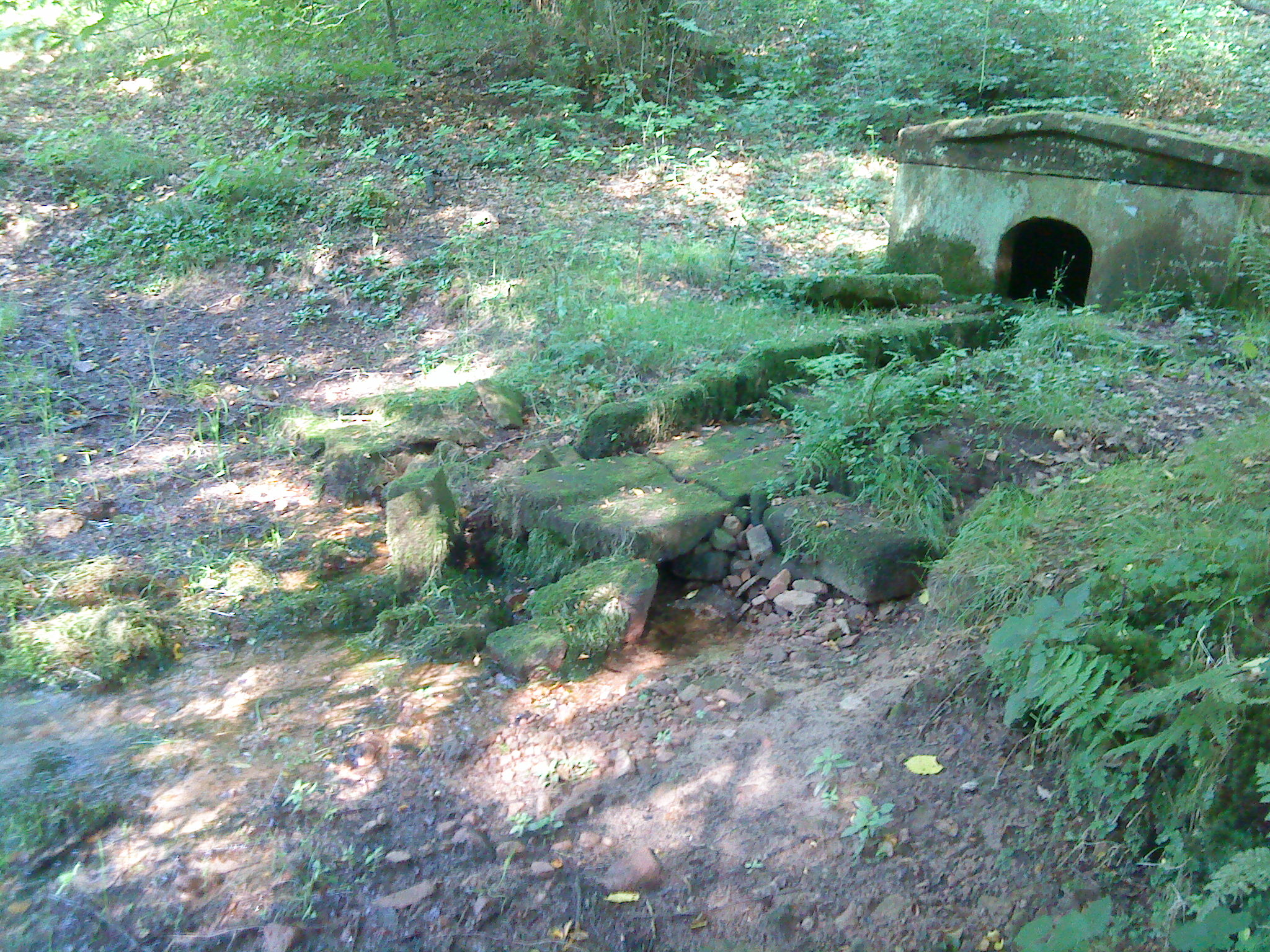 Der Haselbrunnen im Haseltal unterhalb des Geiersberges im Spessart in Unterfranken